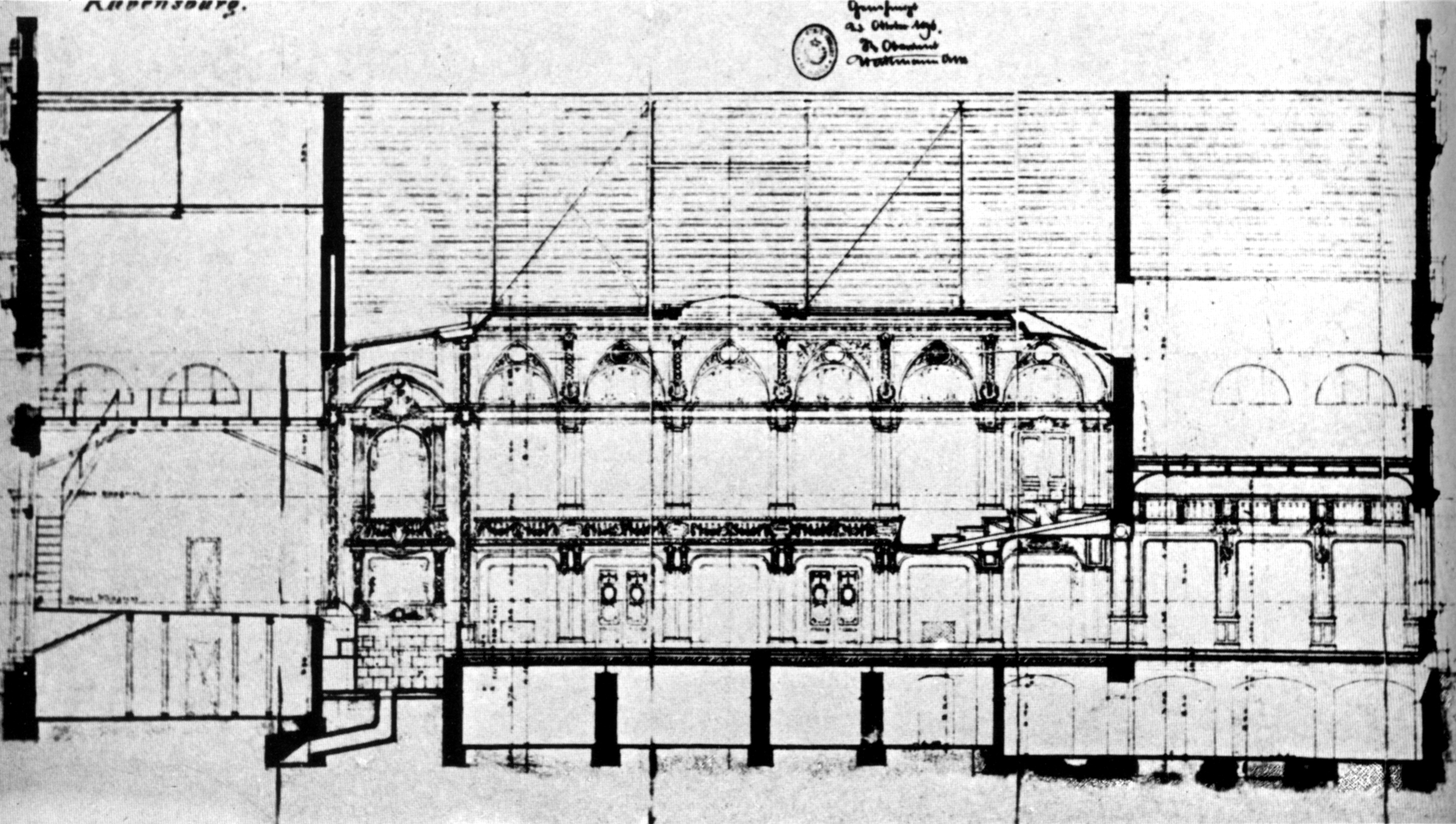 Konzerthaus Ravensburg, Schnitt, Zustand vor der Erweiterung 1899